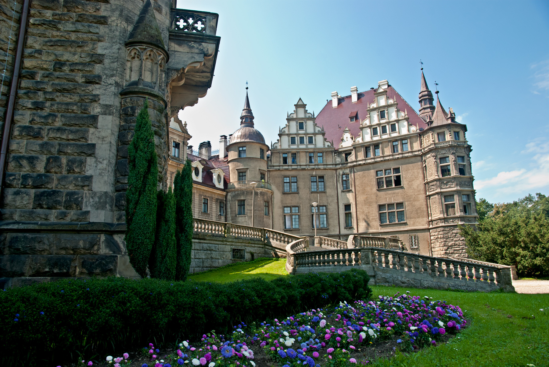 Zamek Moszna jest jednym z najpiękniejszych zamków w Polsce. Położony jest na Opolszczyźnie w miejscowości Moszna, która znajduje się w połowie drogi z Krapkowic do Prudnika. Według jednych źródeł nazwa wsi pochodzi od słowa moszna - w topografii oznaczającego dolinę, natomiast inne źródła informują, iż nazwa wsi związana jest z rodziną Moschin, która w XIV wieku przybyła w tę okolicę. Zamek Moszna w przeszłości należał do rodu Tiele-Wincklerów, a od roku 1972 aż po dzisiaj, w jego murach swoją działalność prowadzi Centrum Terapii Nerwic.